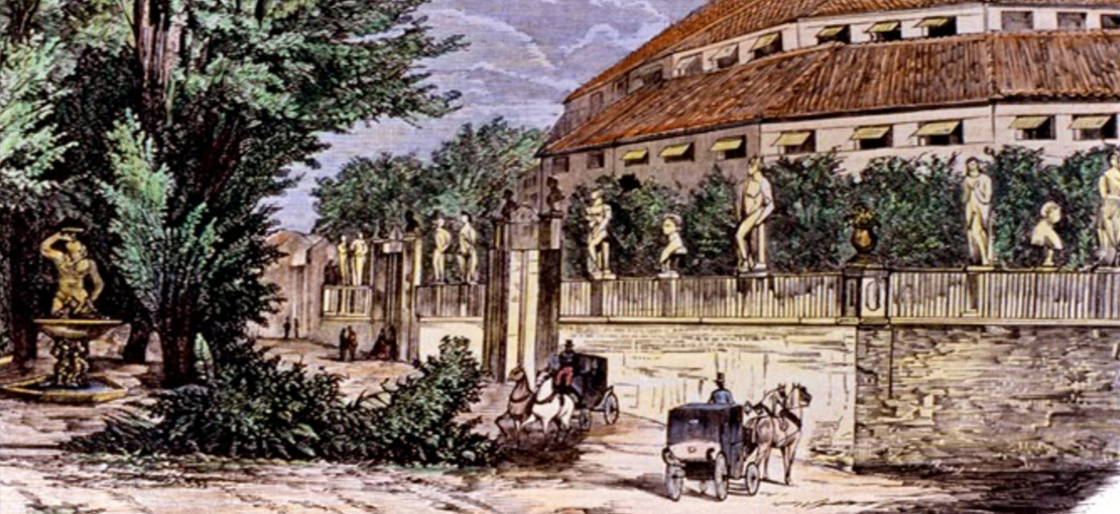 El Circo Hípico de Thomas Price, fundador en 1853 y primer propietario del Circo Price (en su primera instalación del barracón del paseo de Recoletos). A la izquierda, la fuente del Tritón del Paseo de Recoletos de Madrid.